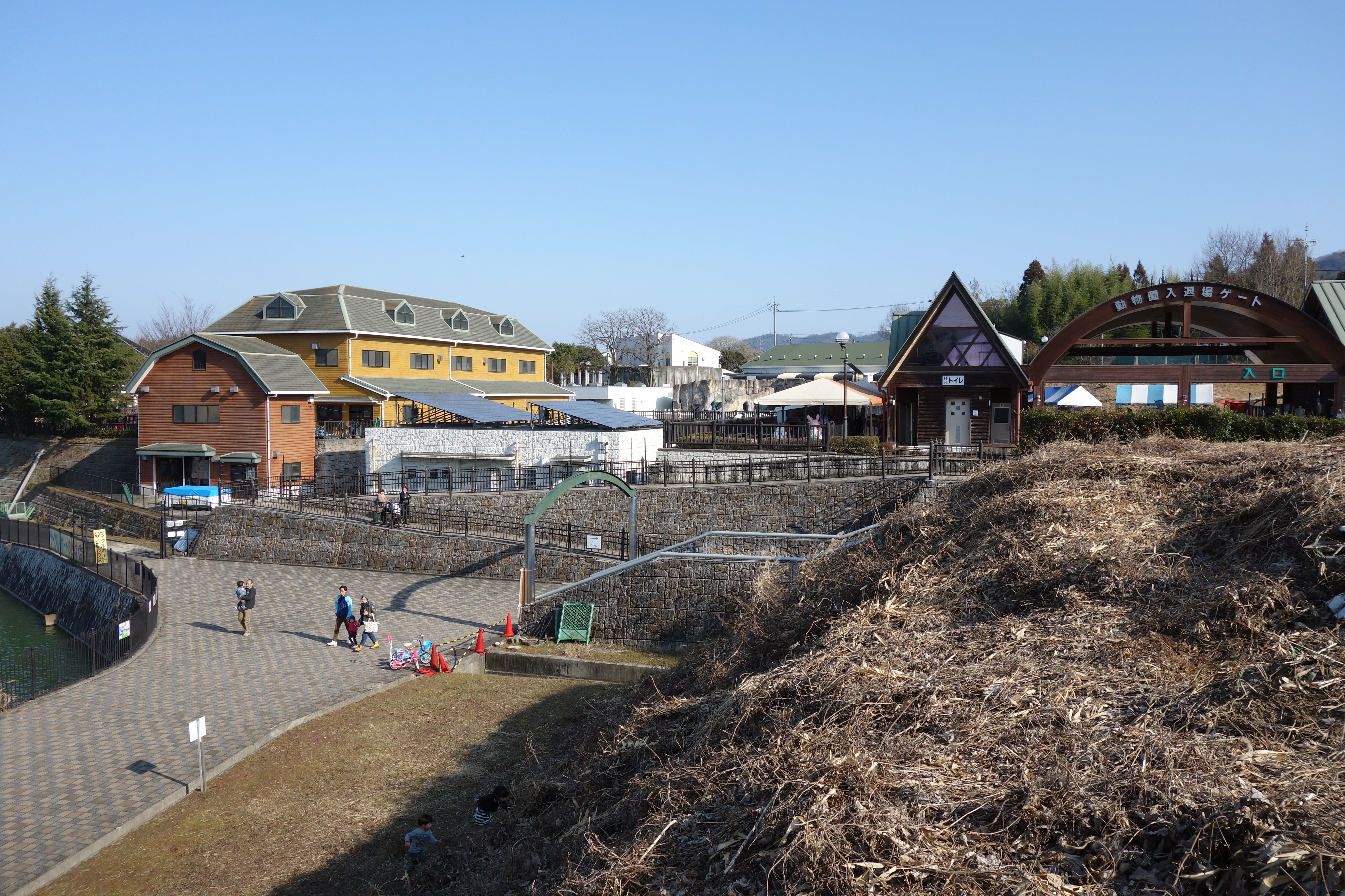 広島県福山市の福山市立動物園・左手の池は富谷池。